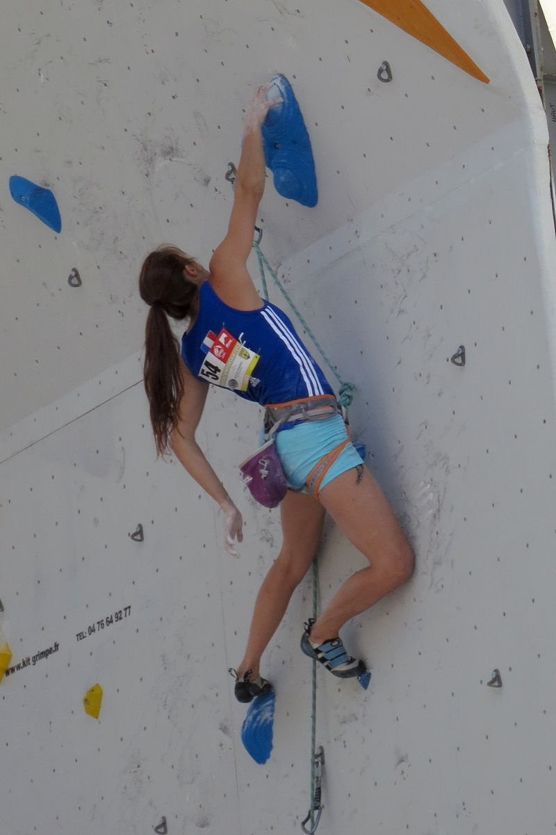 Charlotte Durif en demi-finale du championnat d'Europe d'escalade (difficulté) 2013 à Chamonix